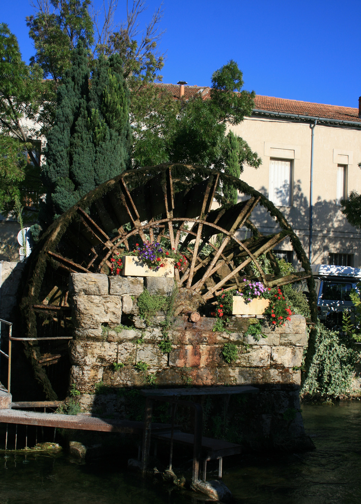 ISLE-sur-la-SORGUE : roue à aube